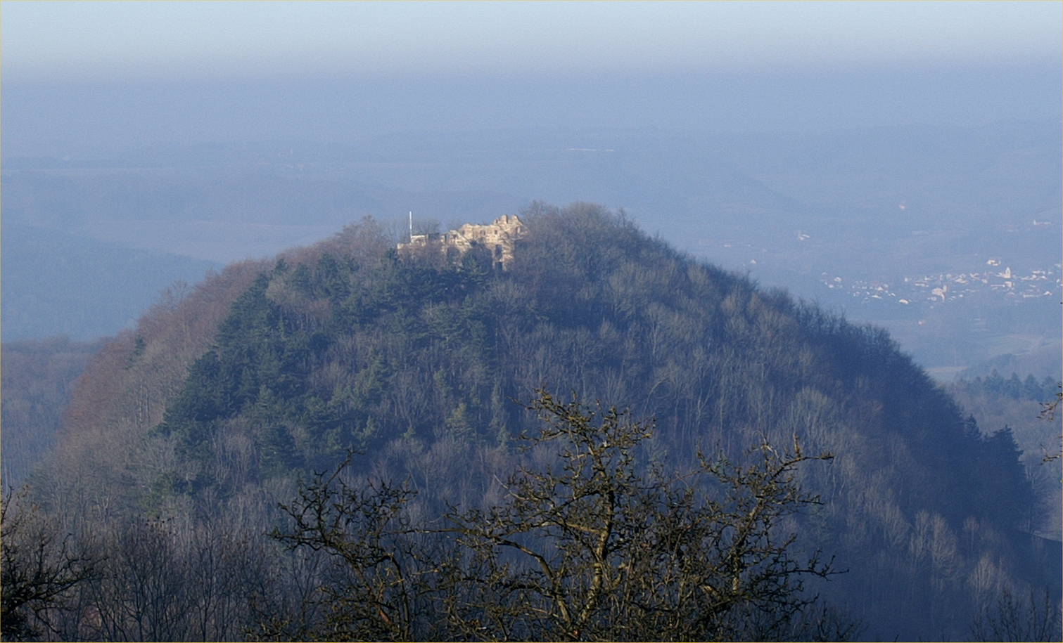 Burg Scharfenberg bei Donzdorf befindet sich auf einem Zeugenberg